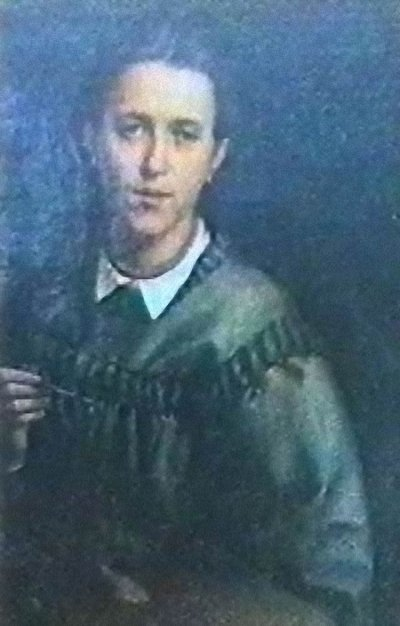 Раевская-Иванова, Мария Дмитриевна (1840-1912). Автопортрет